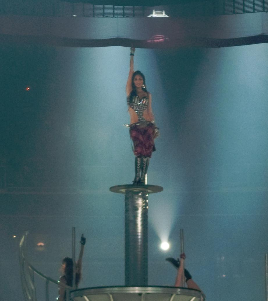 Nicole Scherzinger na abertura do turnê de Britney Spears.